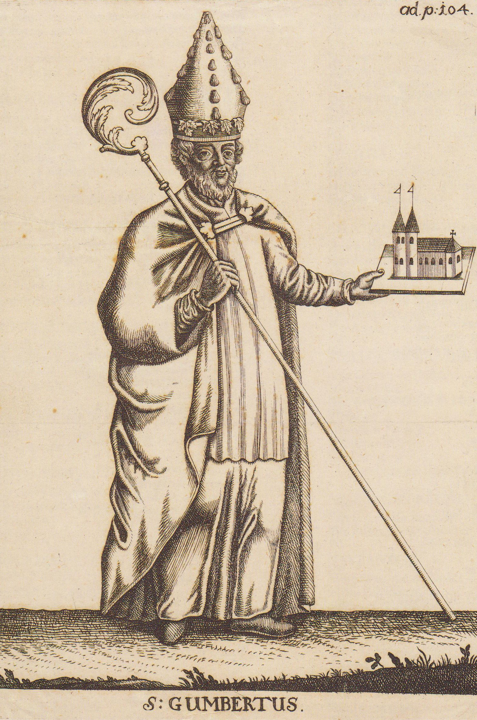 St. Gumbertus, Kupferstich aus Johann Sigmund Strebel: Franconia Illustra, 1761 (Stadtarchiv Ansbach)